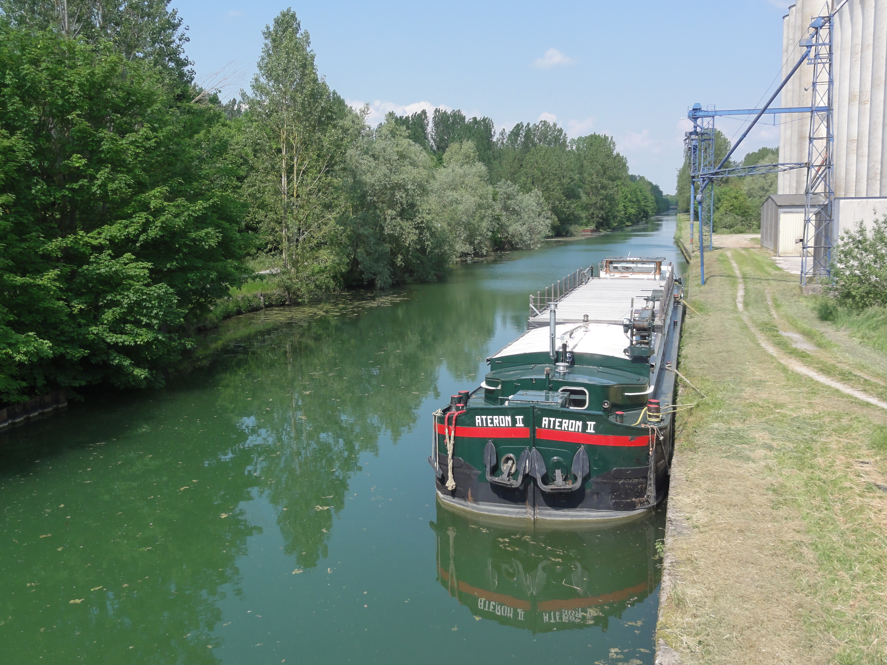 Balham (Ardennnes) Canal de l'Aisne, peniche Ateron II